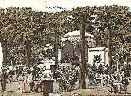 Le Vaux Hall de Bruxelles d'après une carte postale datée de 1898. (détail de la carte multi-vues)